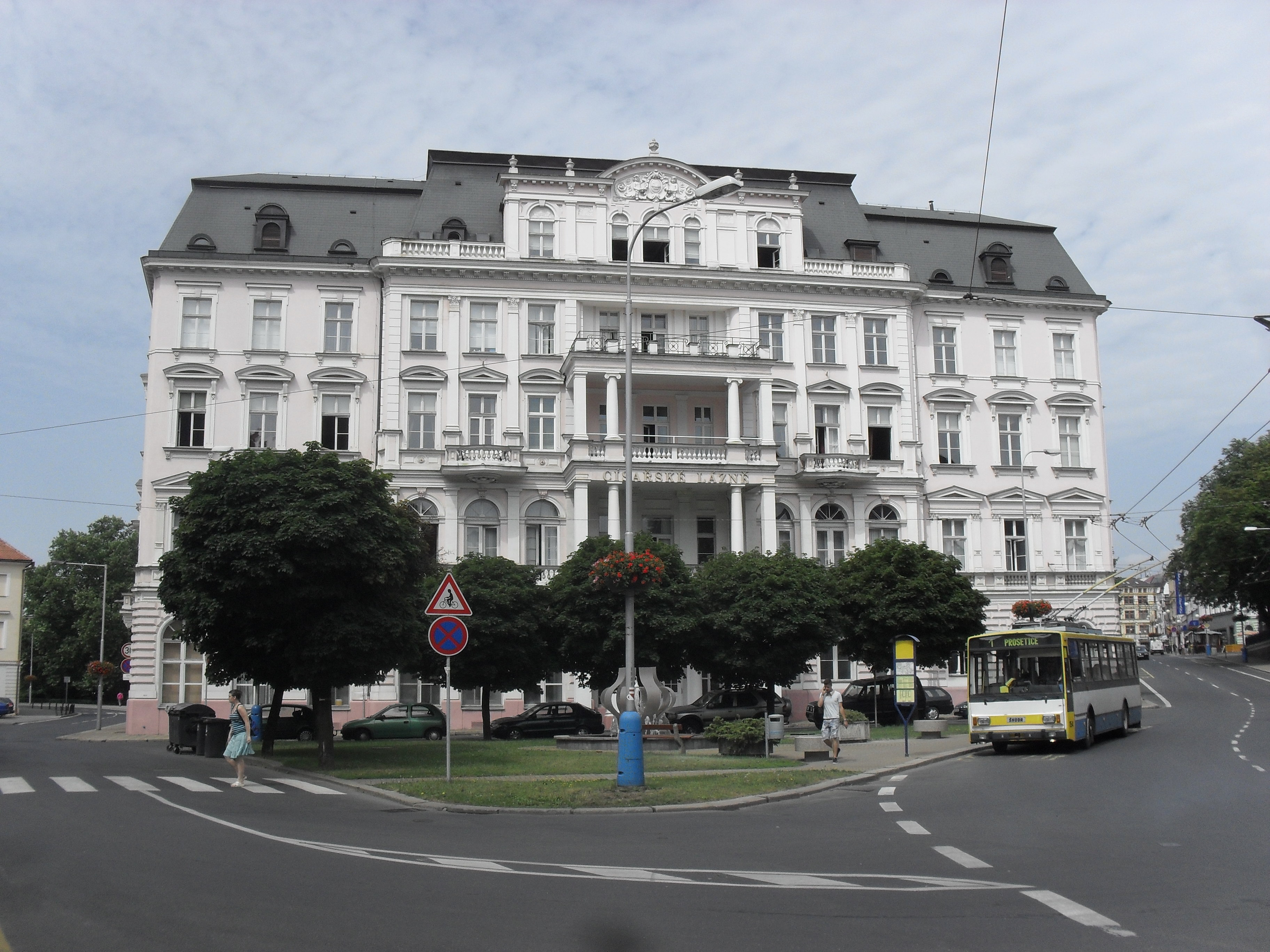 Teplická budova Císařských lázní.